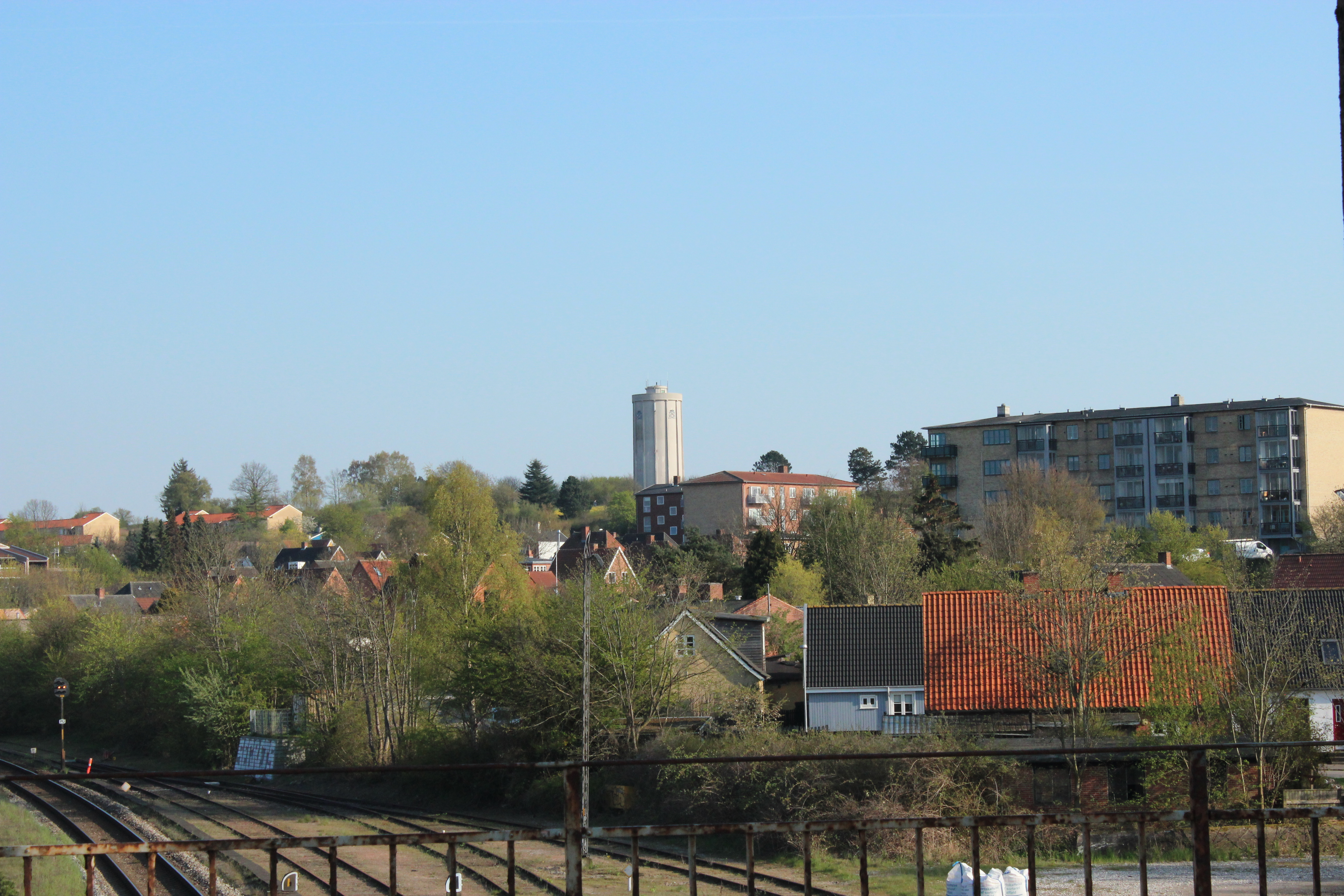 Det tidligere vandtårn, nu kaldet Sjølundtårnet, set fra Rampen.